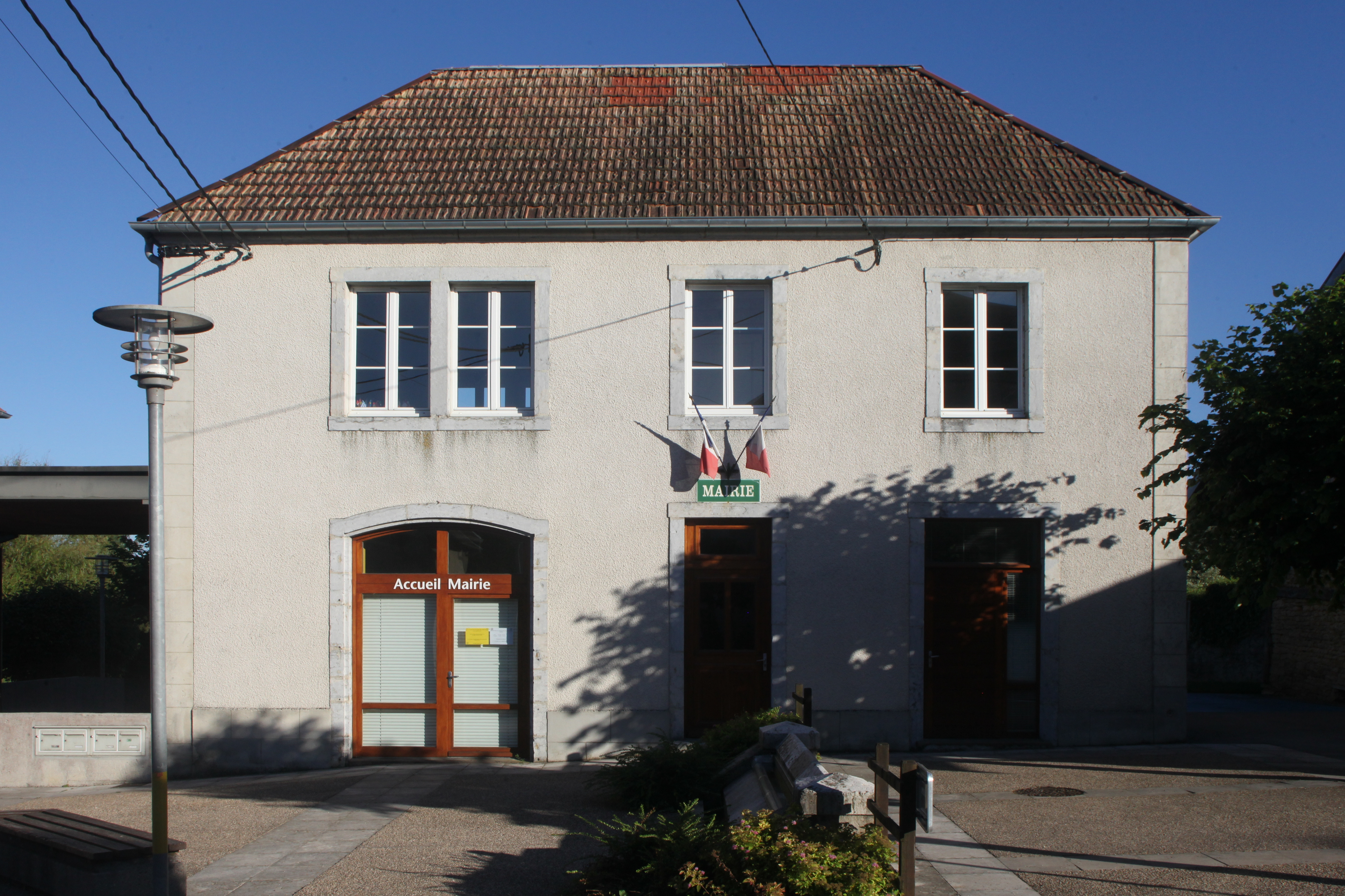 Mairie d'Osse (Doubs).